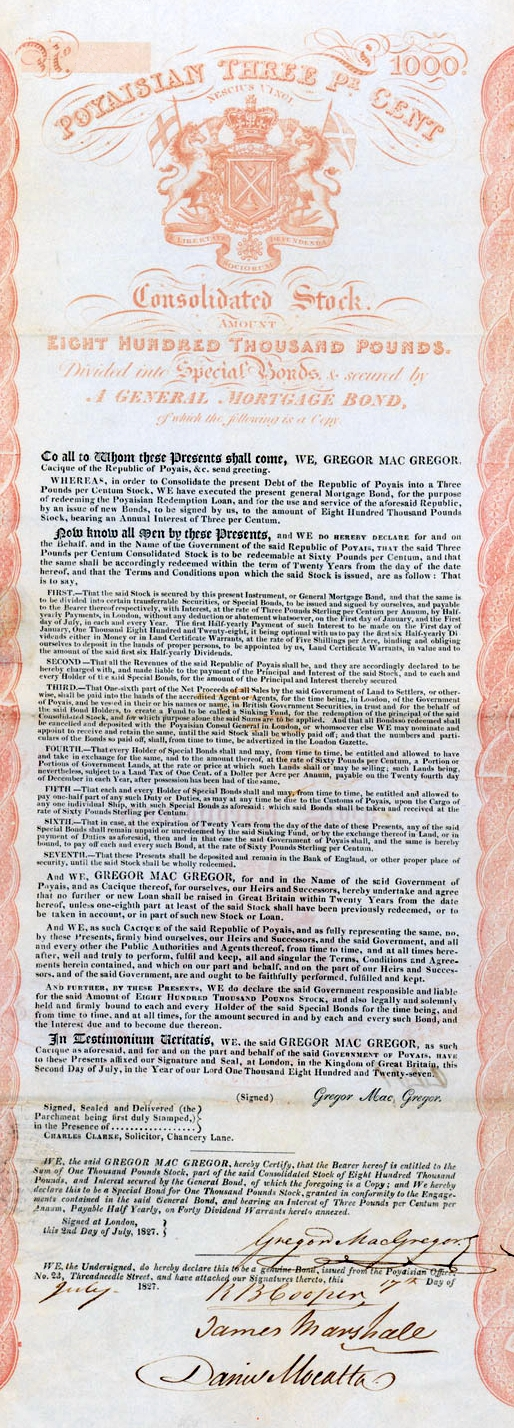 Akte des Phantasielandes Poynais